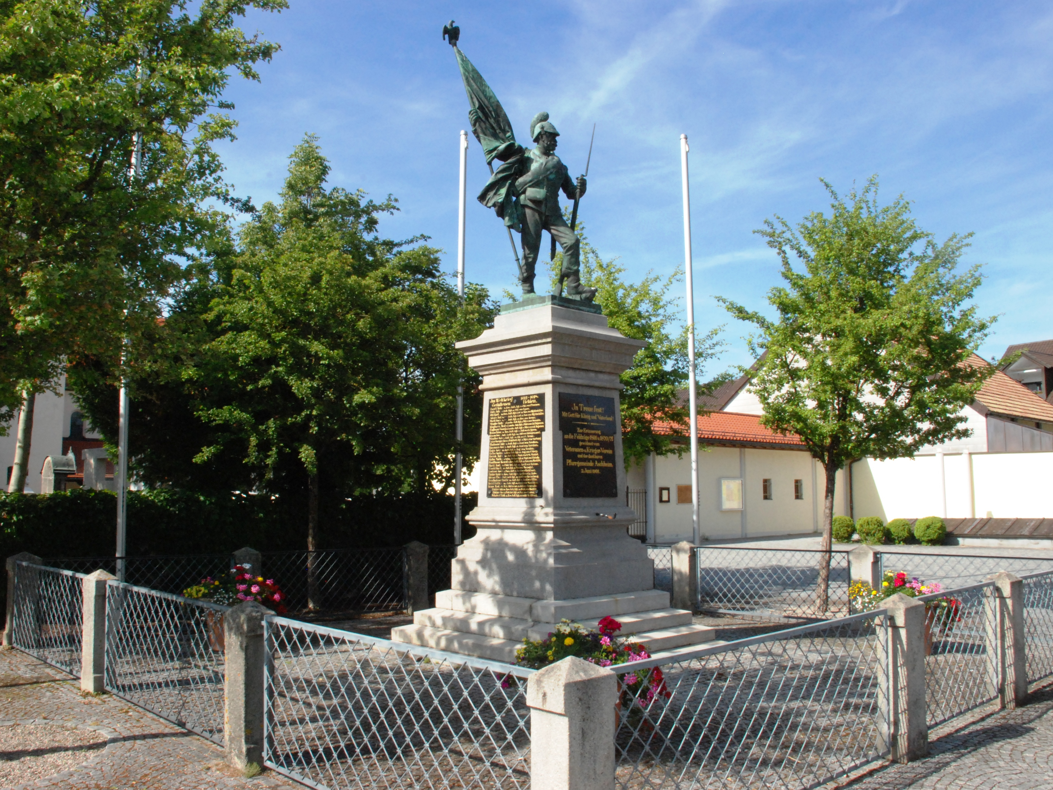 Denkmalgeschütztes Kriegerdenkmal in der Gemeinde Aschheim, Landkreis München